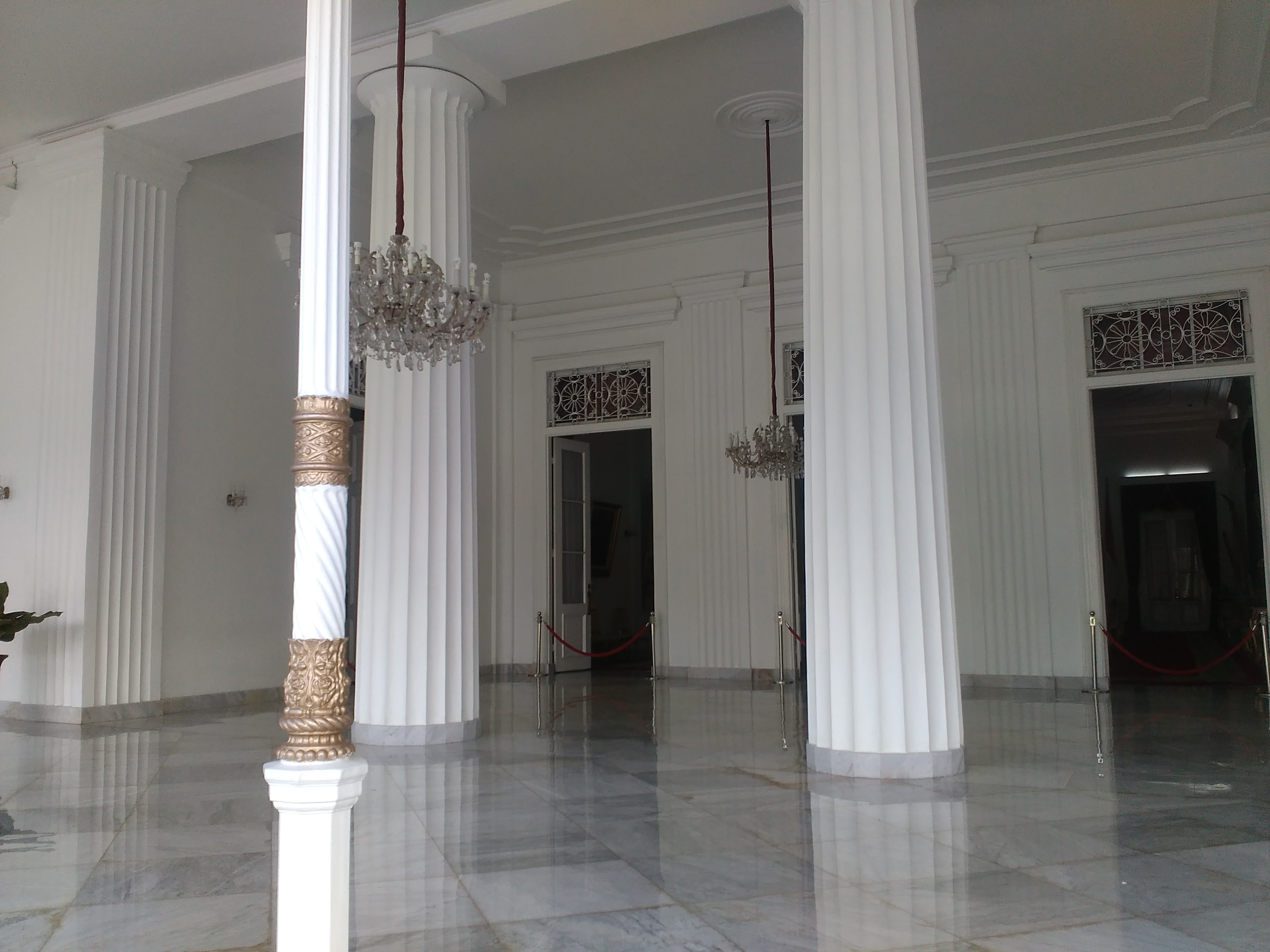 Gedung Agung memiliki gaya arsitektur indis ditandai dengan keberadaan pilar dan pintu yang besar